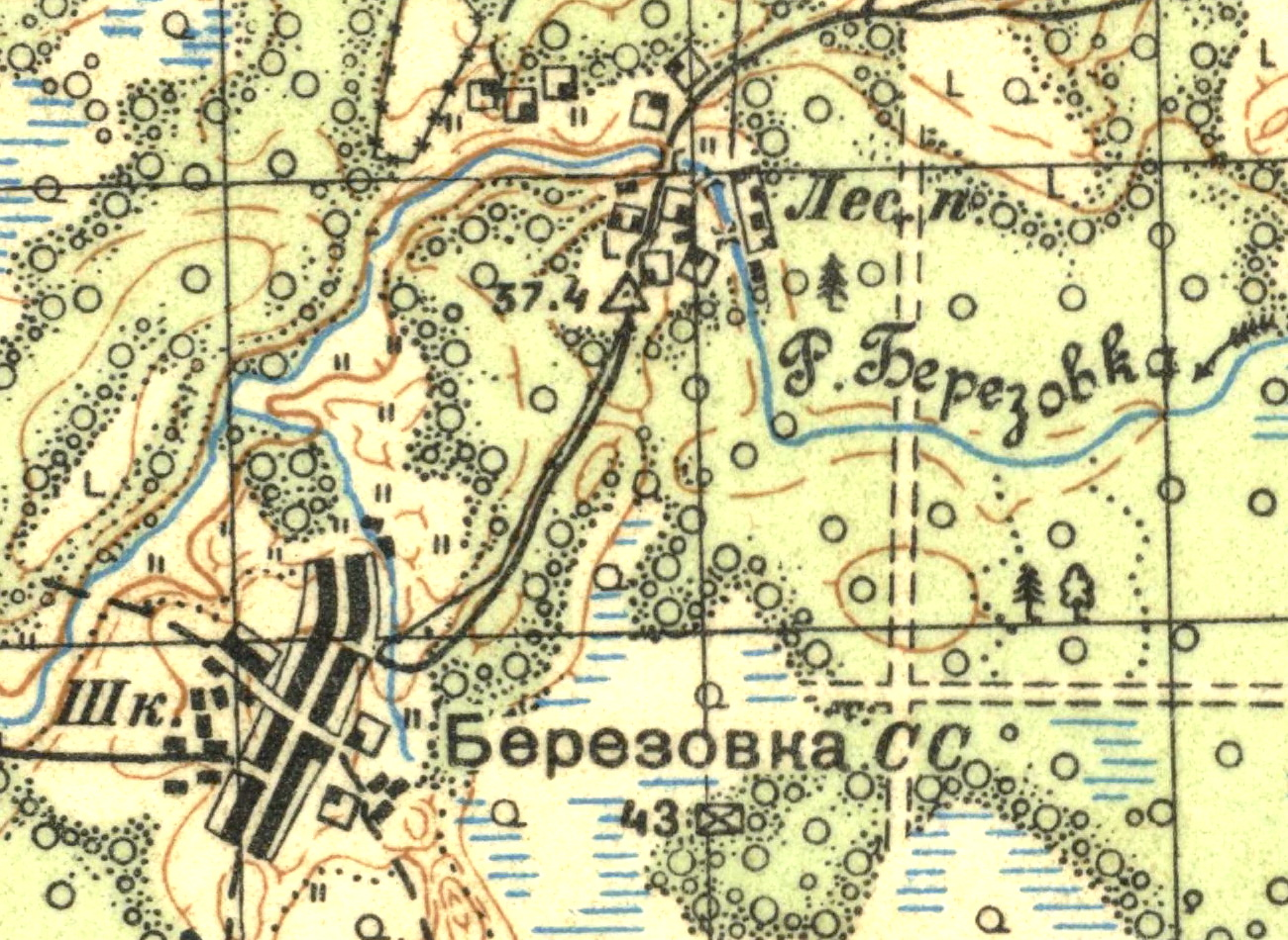 Топографическая карта Ленинградской области, квадрат О-36-15-Б (Мгинский и Тосненский р-ны), деревня Берёзовка